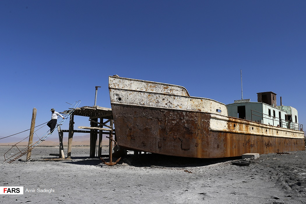 بندرشرفخانه بندرشرفخانه بزرگ‌ترین بندر دریاچه ارومیه‌ است. این بندر از توابع شهرستان شبستر در استان آذربایجان‌شرقی است و فاصله آن از شهرستان شبستر ۲۰ کیلومتر و از شهر تبربز حدود ۹۰ کیلومتر است اما در پی خشک شدن تدریجی دریاچه ارومیه، این بندر تمام آب خود را از دست داده و اکنون جز چند لنج و کشتی به نمک نشسته و اسکله ویران شده، چیزی از آن باقی نمانده است.